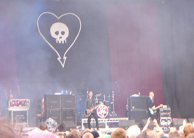 Alkaline Trio at leedsfestival 2005